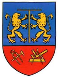 coat Budapest 19 district